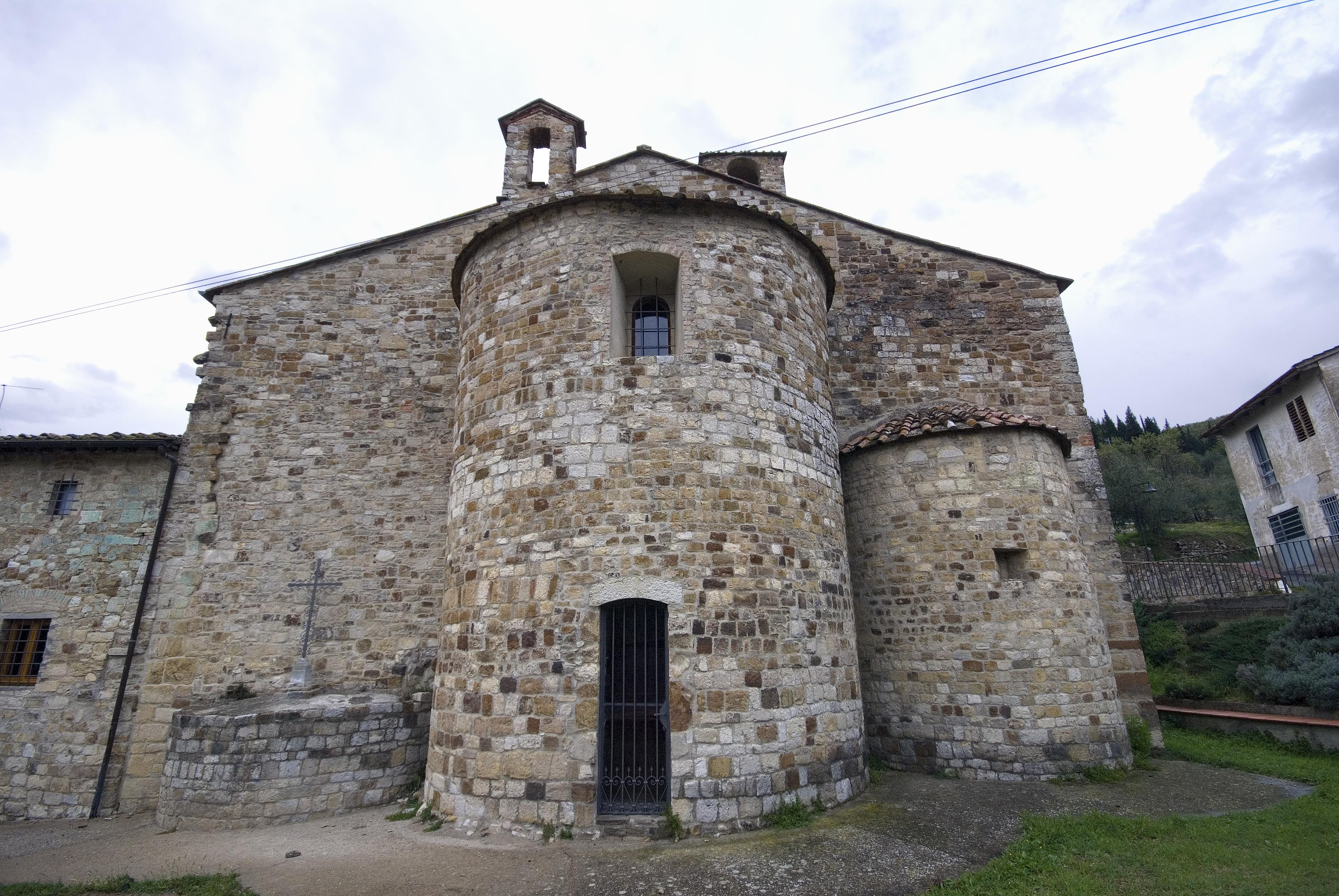 pieve di san severo a legri (Calenzano -abside